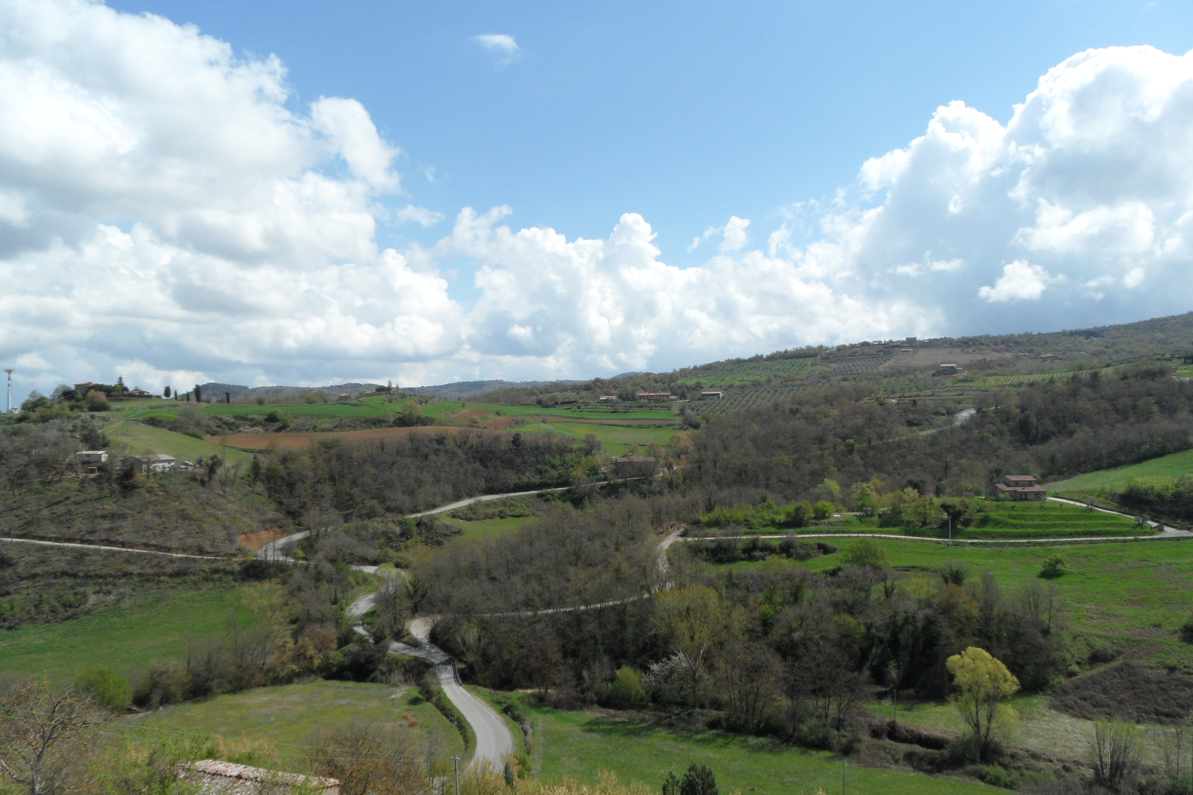 06066 Piegaro PG, Italy